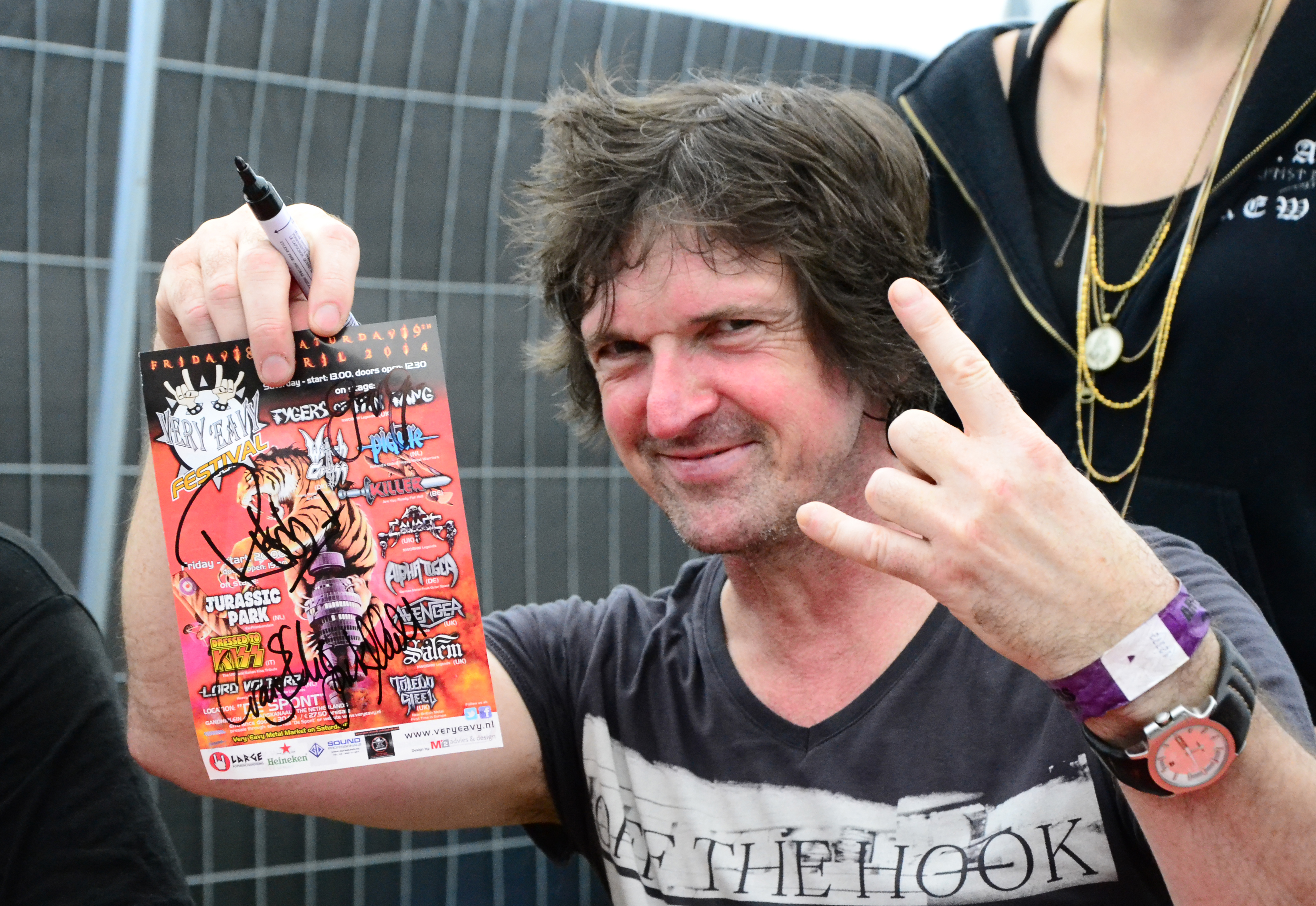 Craig Ellis von Tygers of Pan Tang beim Headbangers Open Air 2014